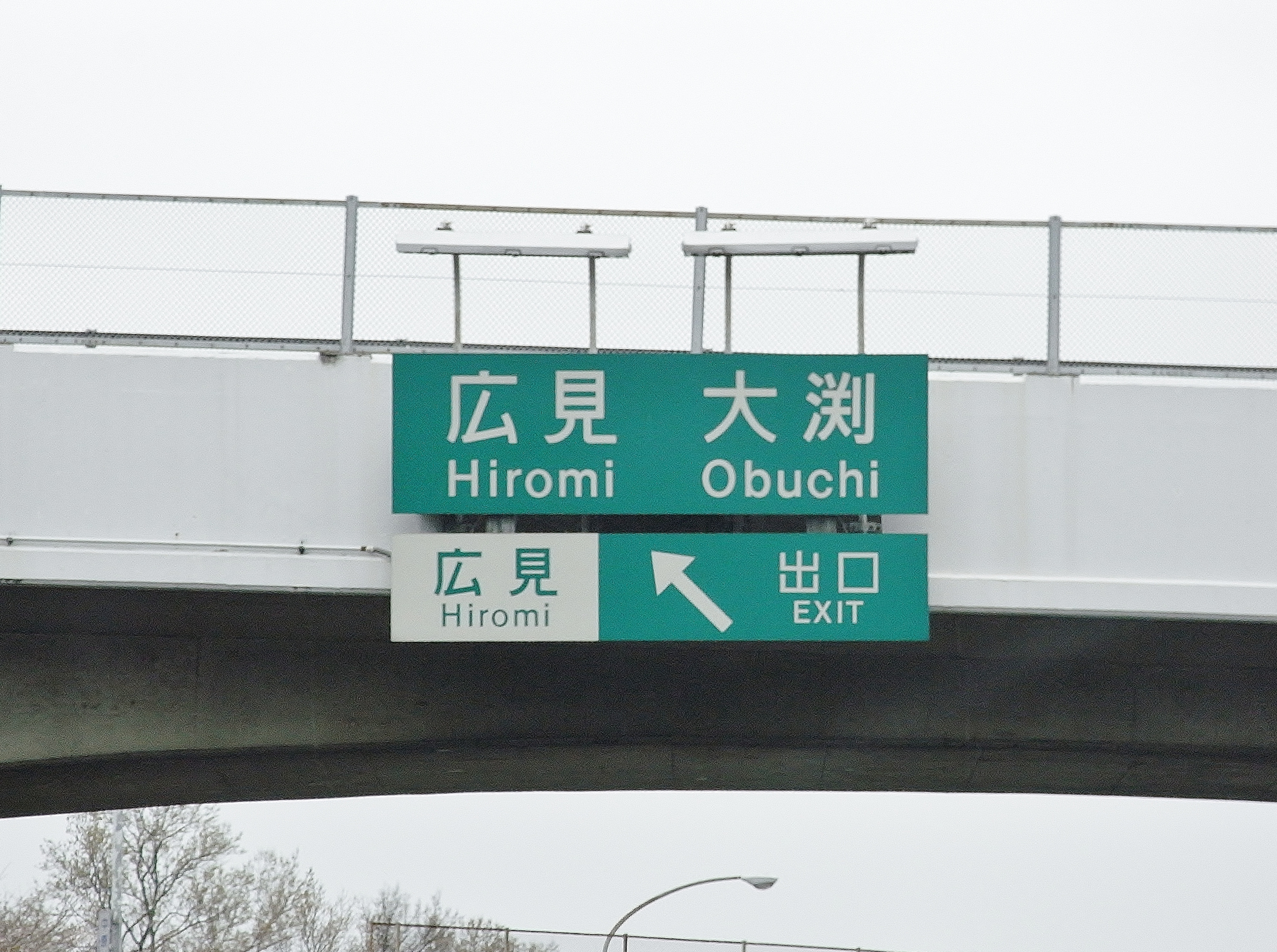 西富士道路広見IC、上り線出口標識